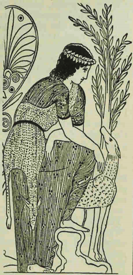 Senza didascalia. Immagine originale: Chiton 4thC ncd 2012.